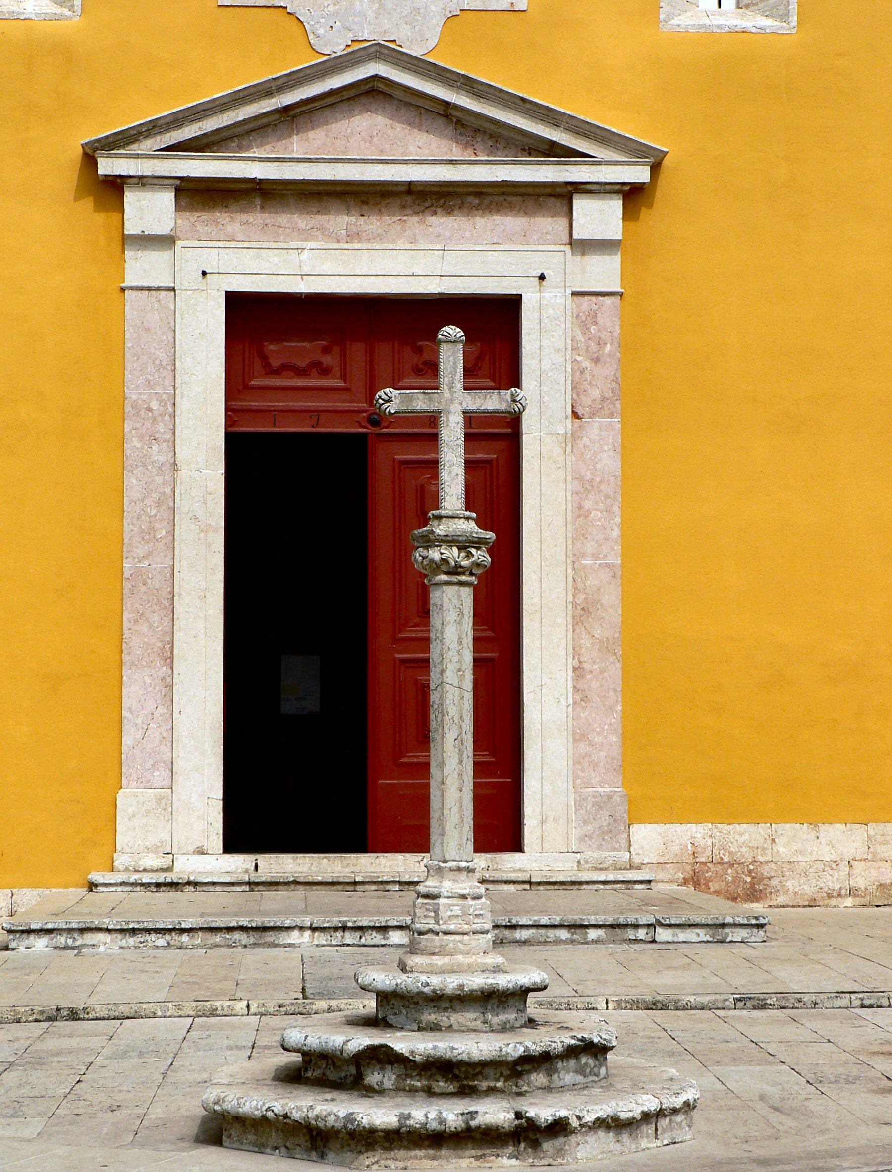 Cruzeiro de Loures defronte da Igreja Matriz Nota (2011) - Este cruzeiro já não está lá, foi roubado em 2007 e resta apenas a base.